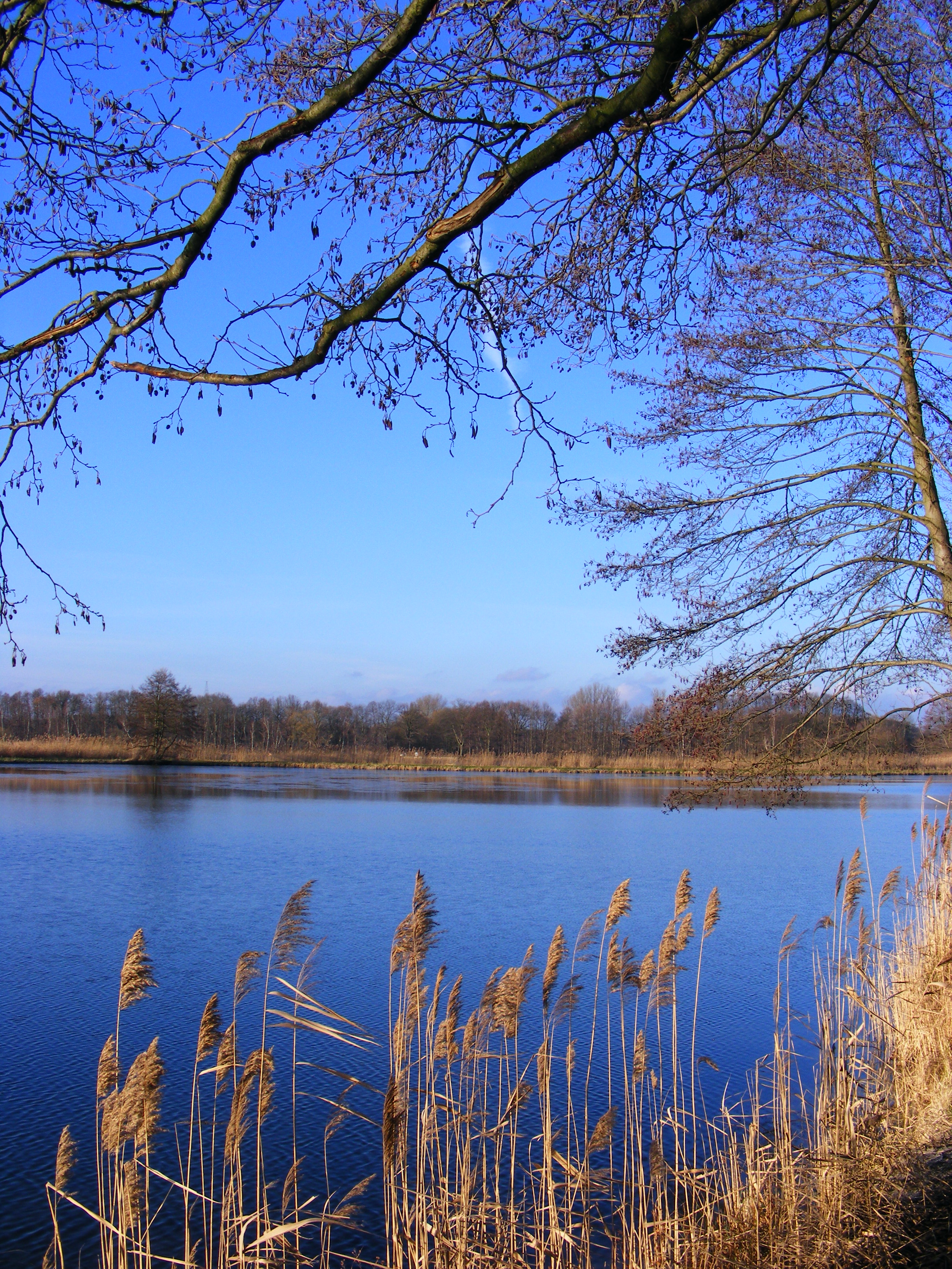 Schilf-Blick